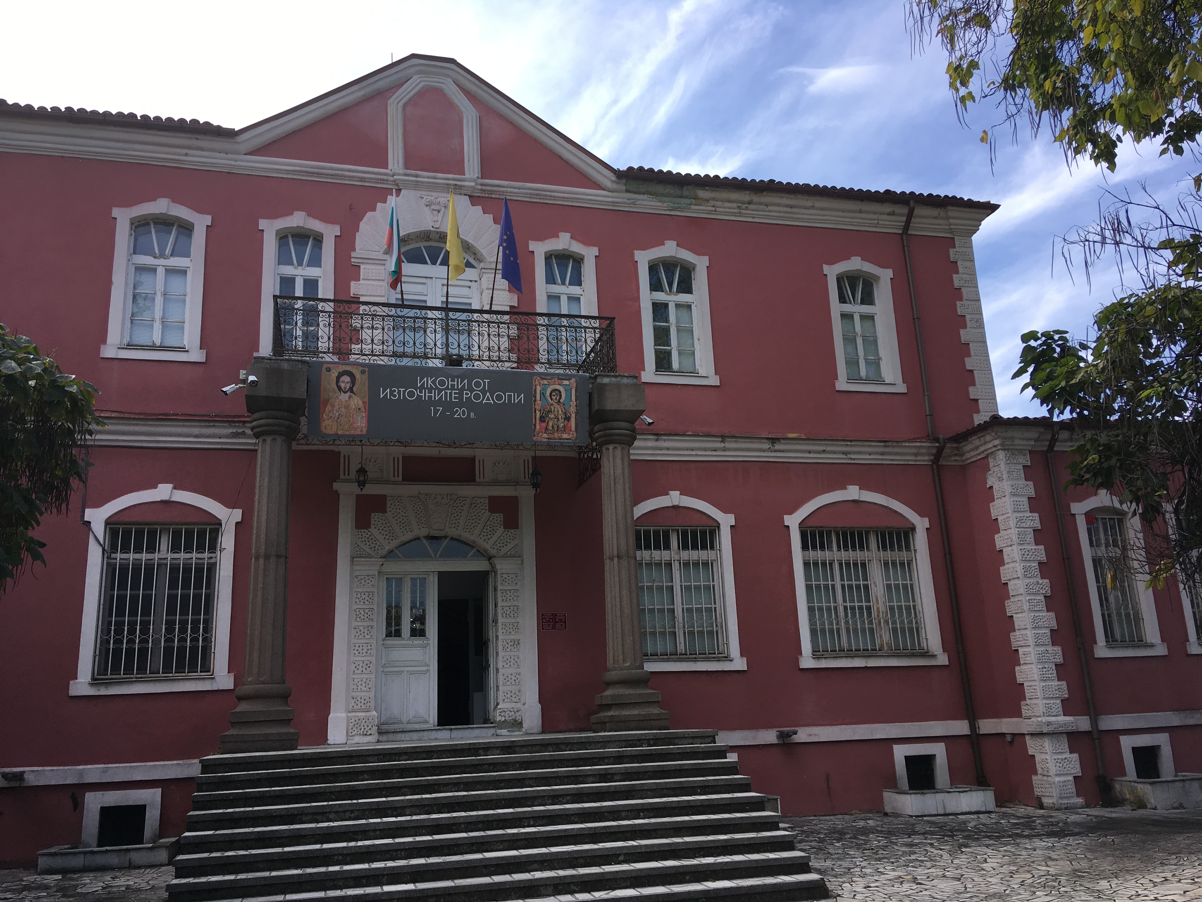 Художествена галерия „Станка Димитрова“ Кърджали